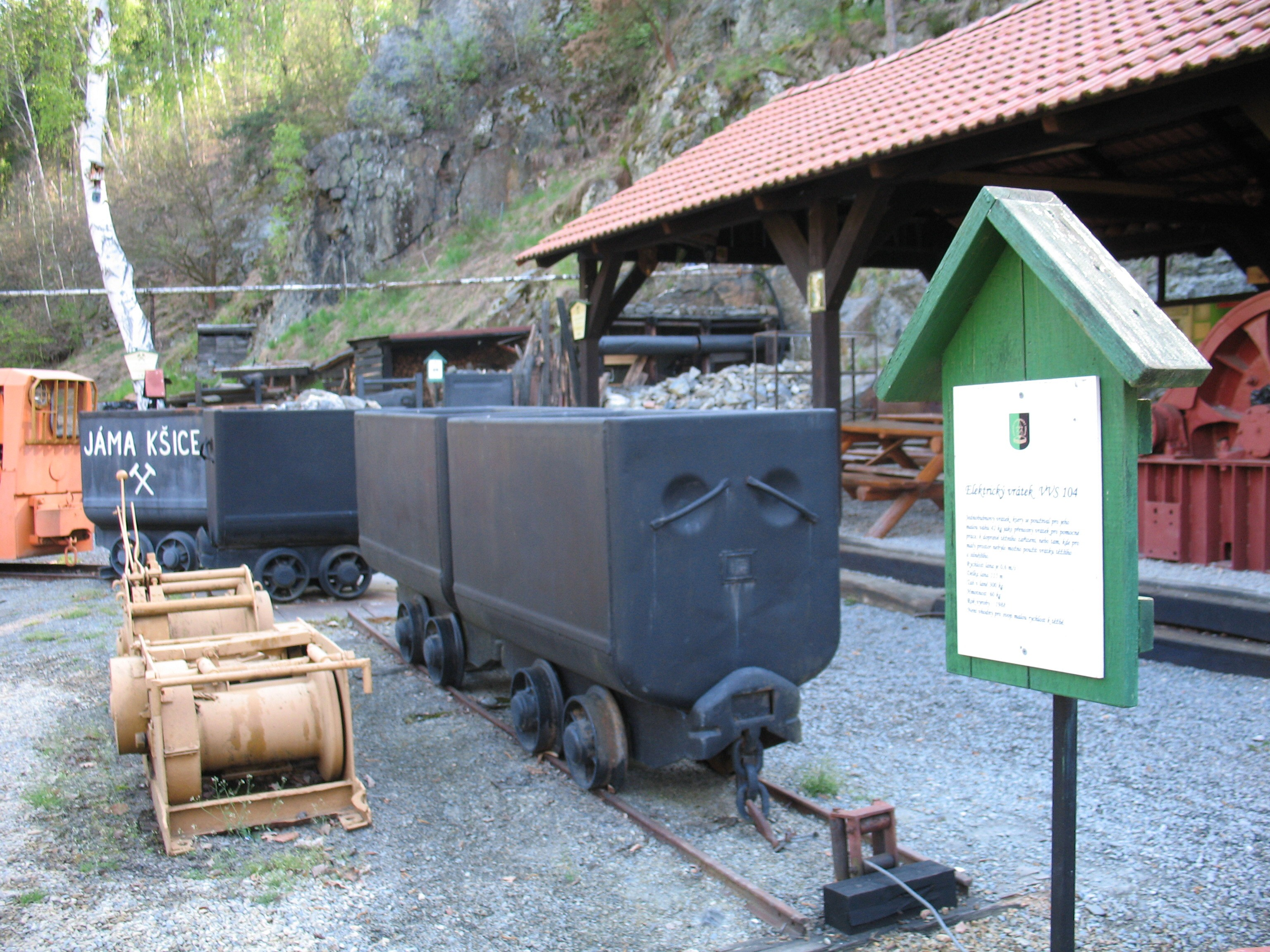 Ve skanzenu